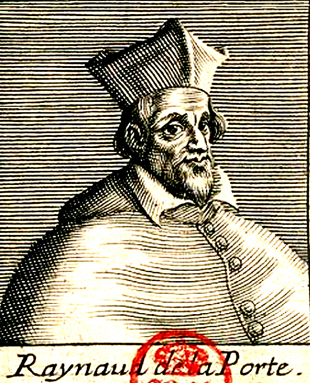 Cardinal Raynaud de La Porte